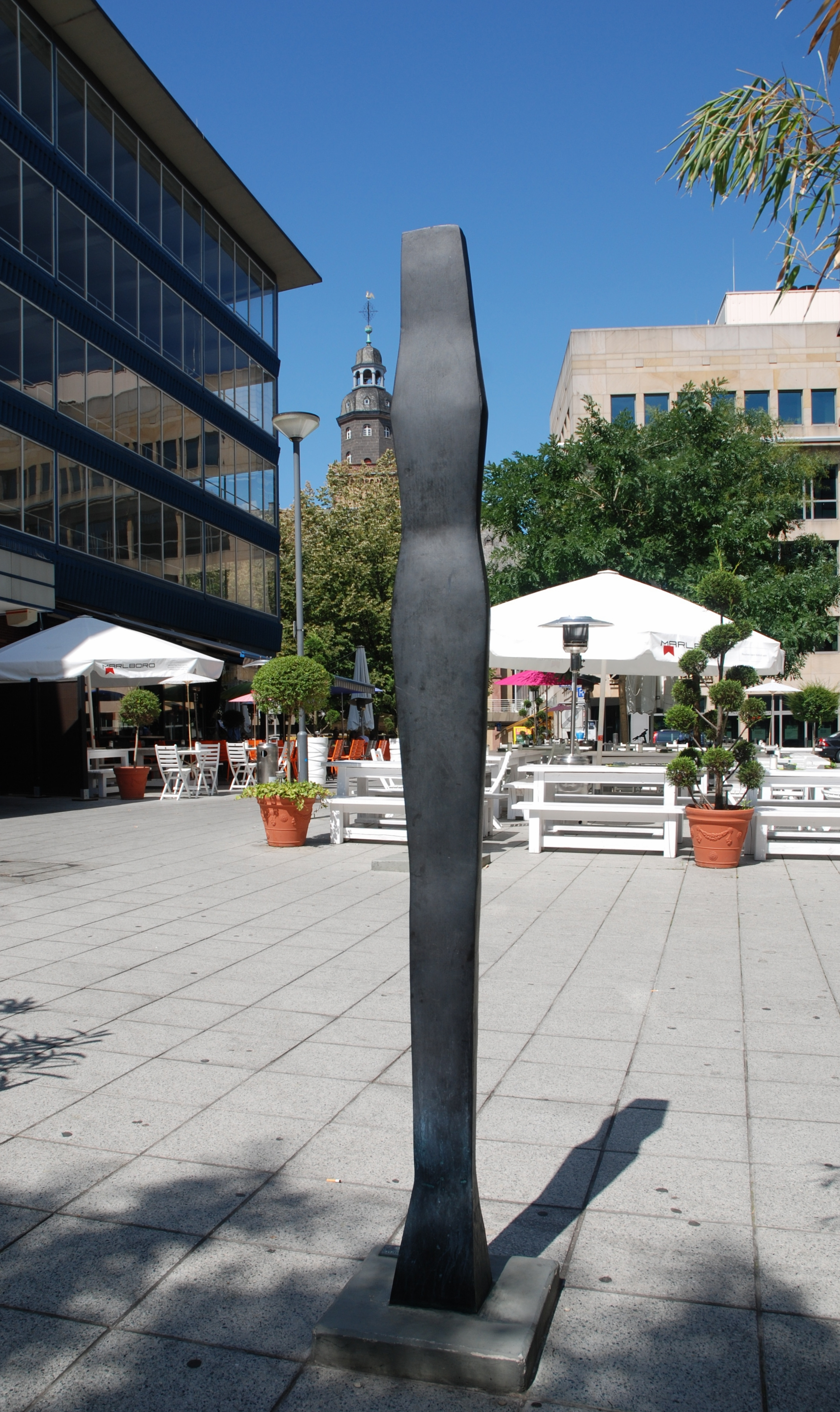 Große Stehende (1978) von Christa von Schnitzler. Bronzeguss, 204 cm hoch. Standort: Sandgasse, Frankfurt am Main. 1980 aufgestellt.